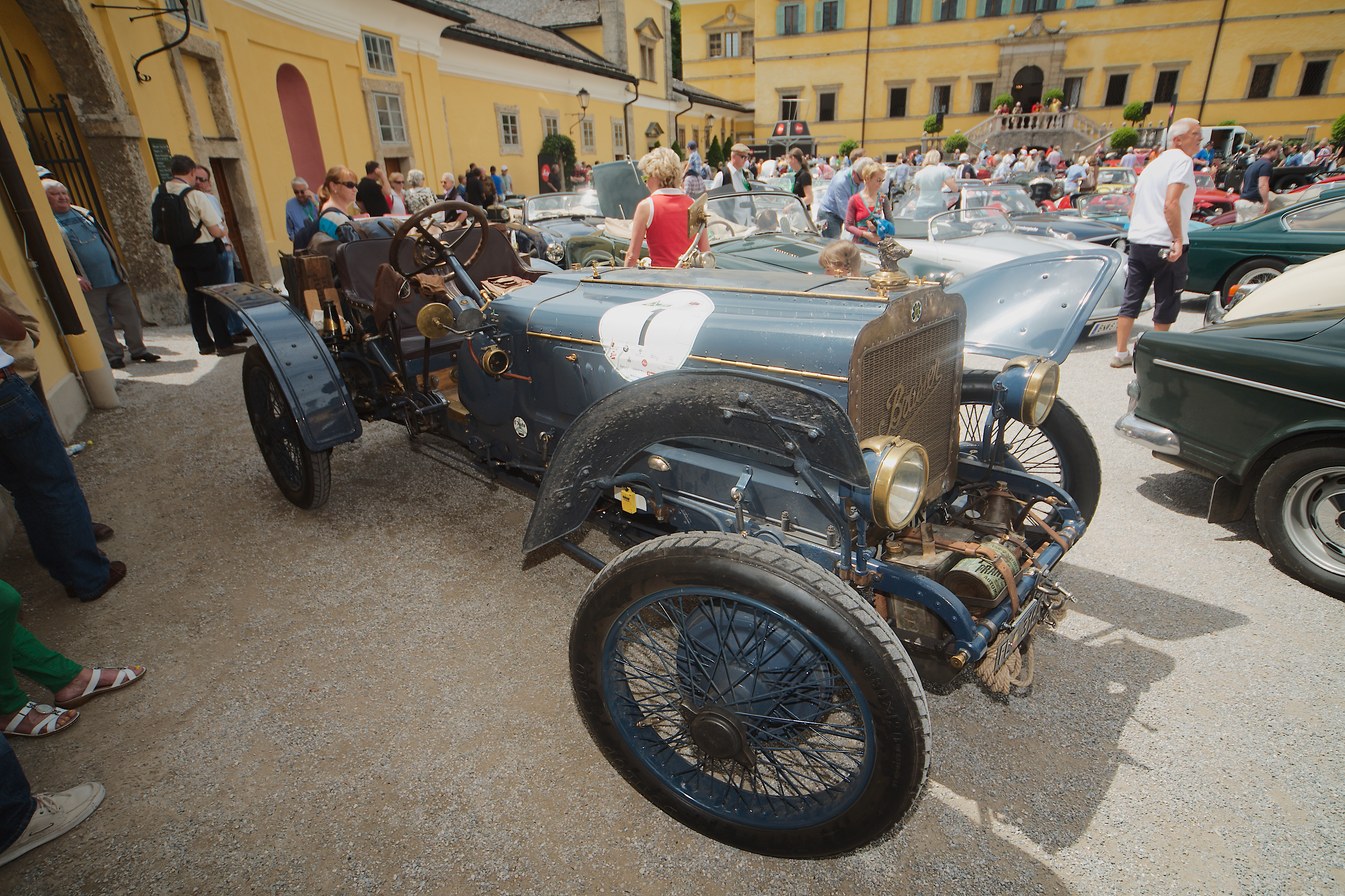 Brasier 1908 9500ccm Gaisbergrennen 2012